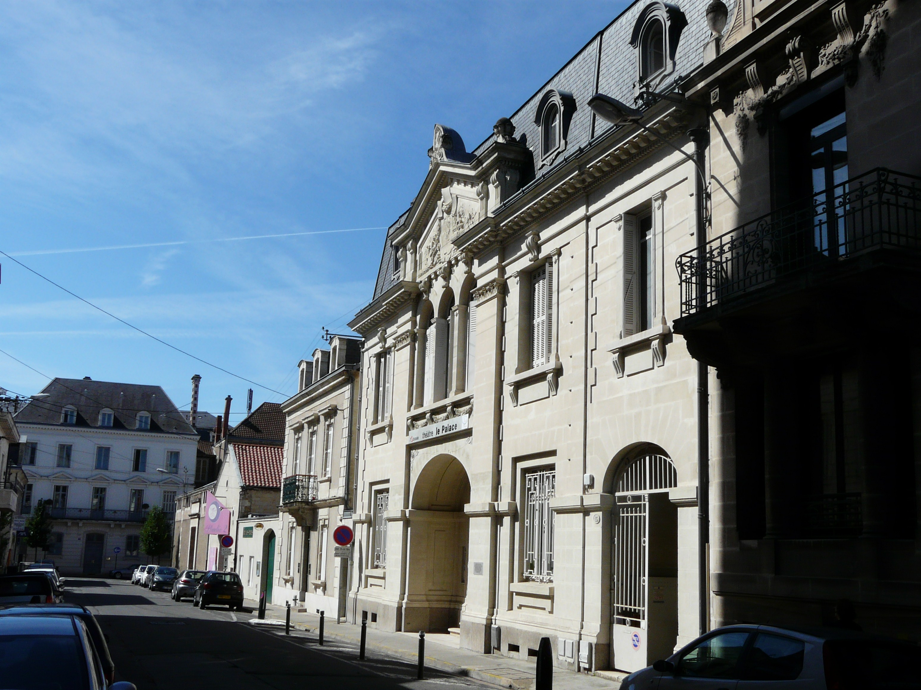 Le théâtre le Palace, 15 rue Bodin, Périgueux, Dordogne, France.